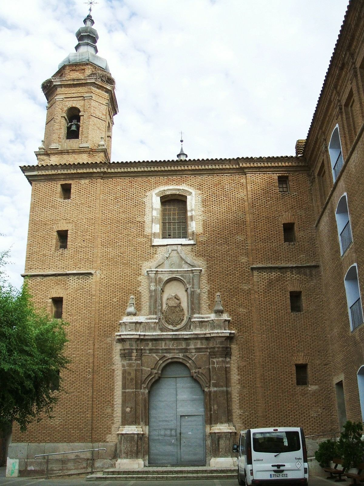 Iglesia del ex colegio jesuita de San Antonio de Padua, Alagón, Zaragoza, Aragón, España